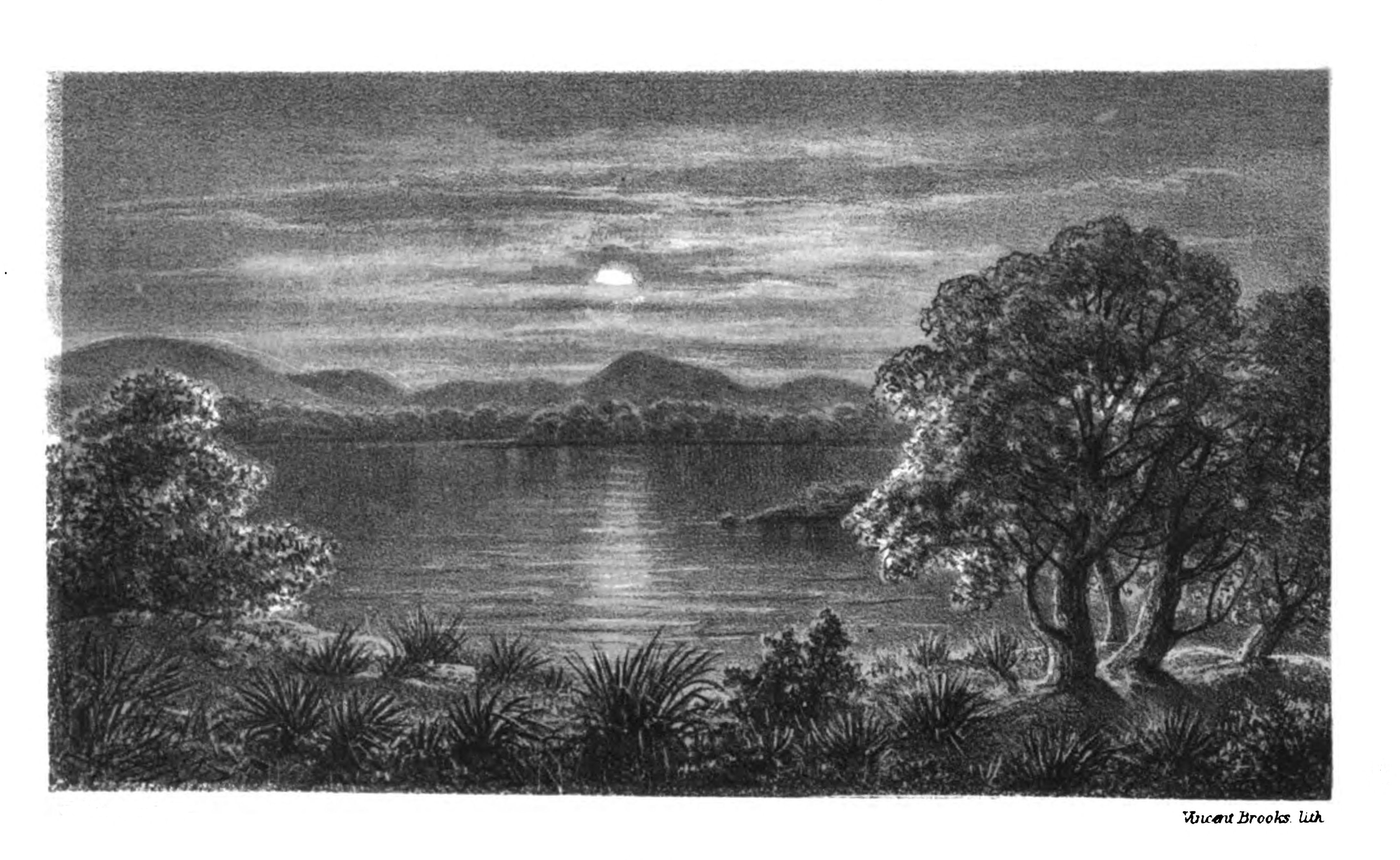 Lake Buchanan